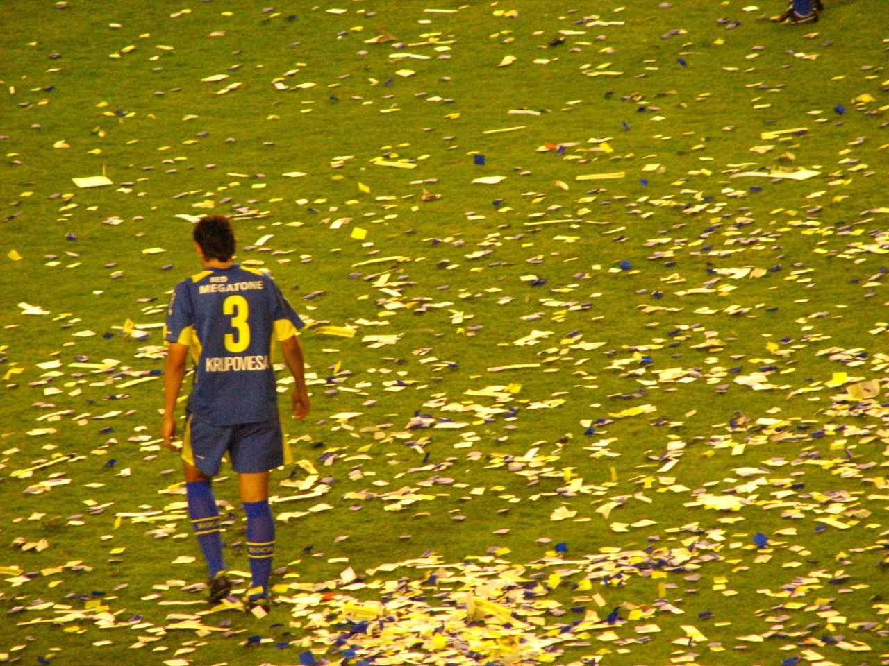 Juan Krupoviesa en partido de vuelta de la final de Copa Sudamericana 2005